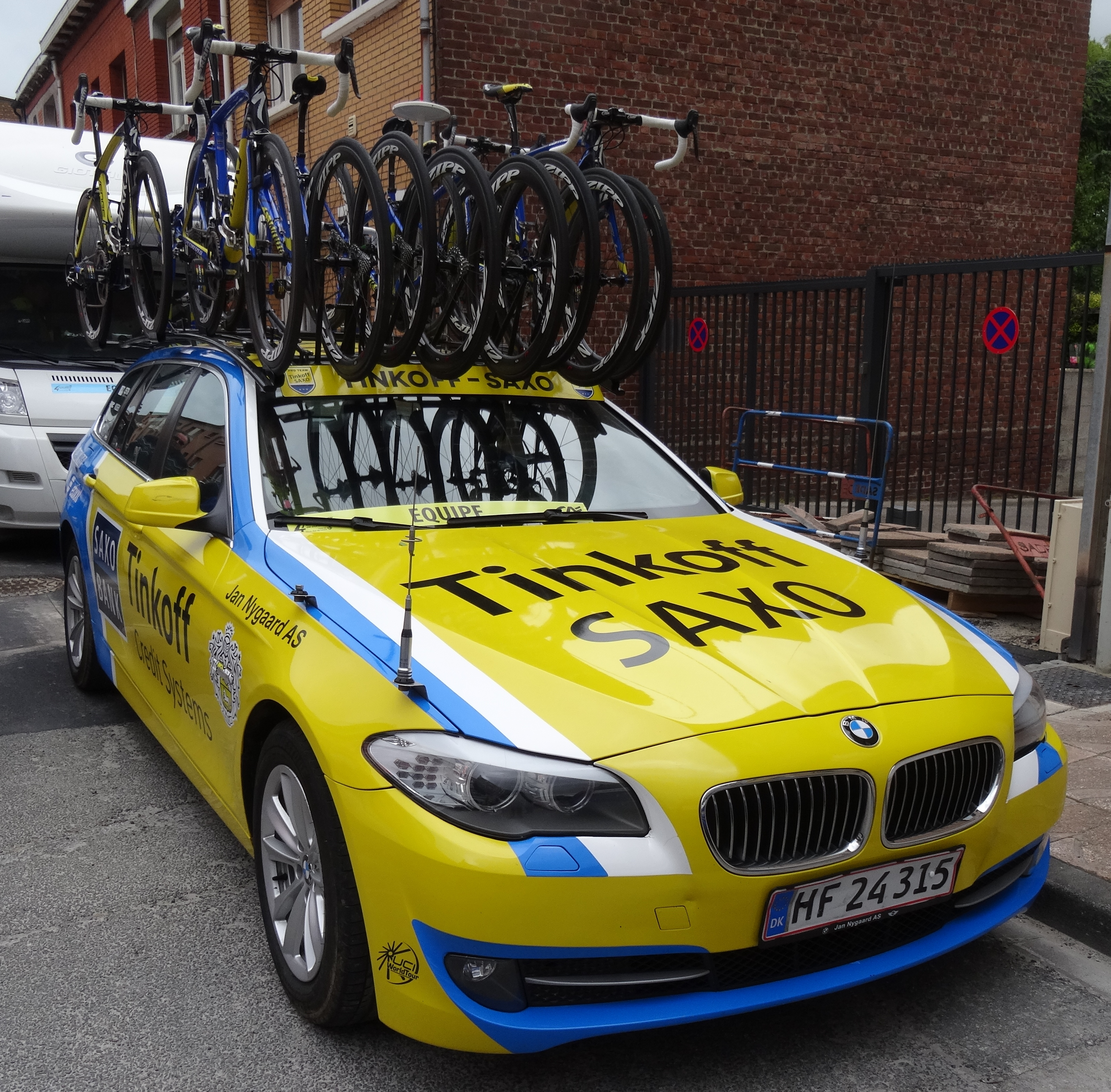 Reportage photographique réalisé le dimanche 11 mai 2014 au départ de la cinquième et dernière étape de l'édition 2014 des Quatre jours de Dunkerque à Saint-Pol-sur-Mer, Nord, Nord-Pas-de-Calais, France. Depicted team: Tinkoff-Saxo